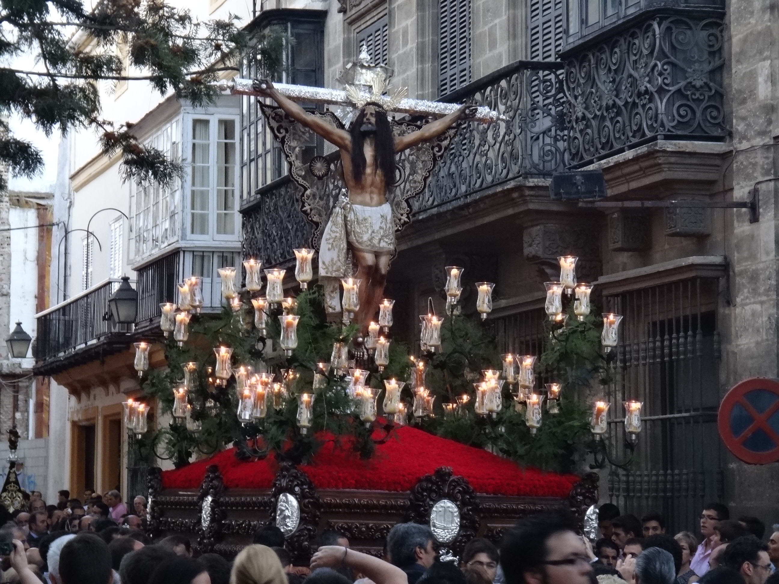 Salida extraordinaria de Cristo de la Expiración con motivo de los 425 años de la fundación de su Hermandad. Jerez de la Frontera (Andalucía, España)